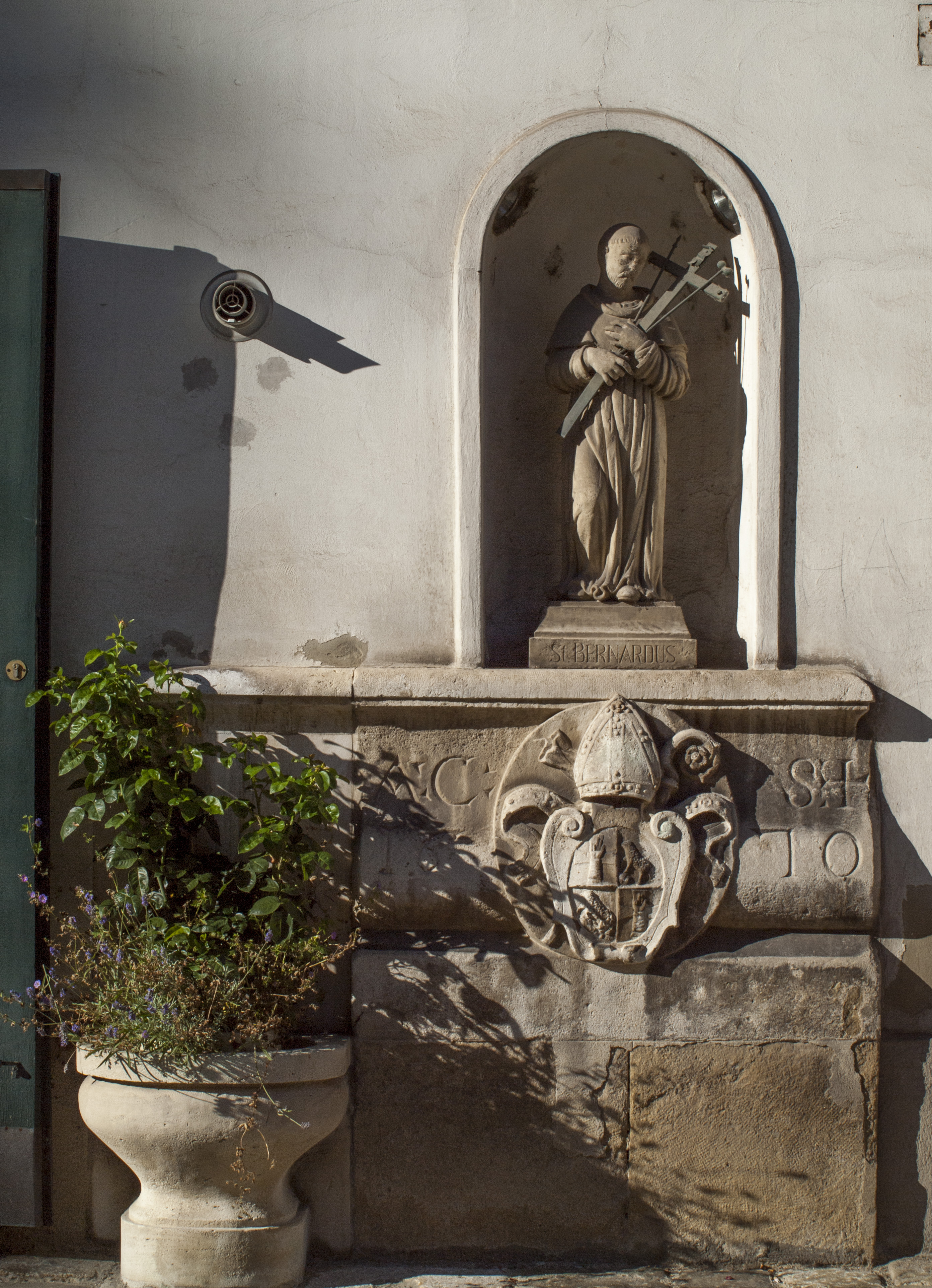 Heiligenkreuzerhof mit Kapelle hl. Bernhard